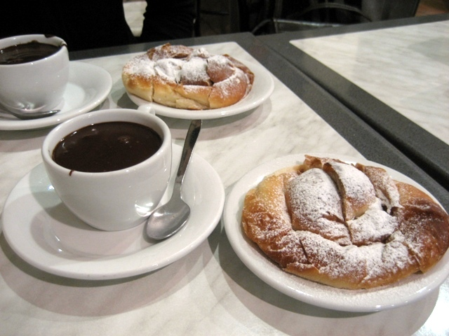 Tazas de chocolate caliente con ensaimadas.